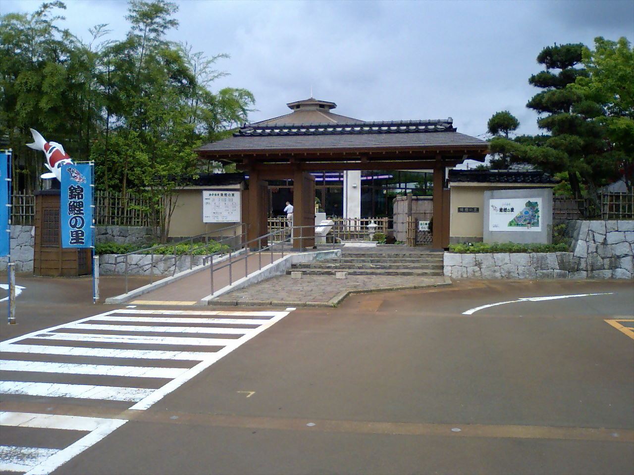 この画像は2006年7月4日投稿者によって、新潟県小千谷市城内一丁目にて撮影された、"錦鯉の里"の正面入口の写真。